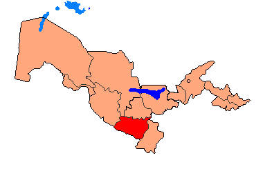 Uzbekistan - Qashqadaryo Province